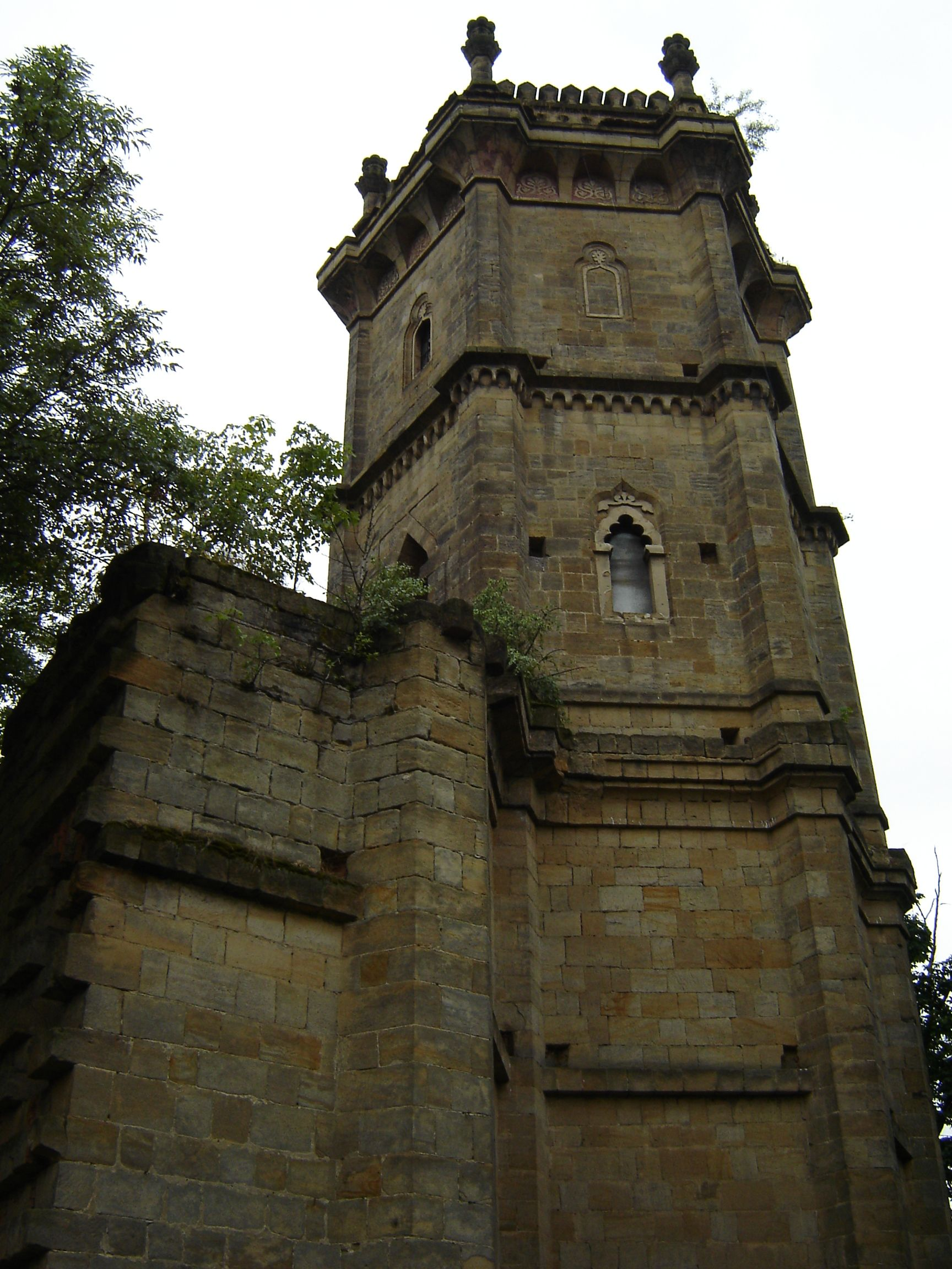 Zámek - zámeček Slavín Tupadly, Tupadly 87